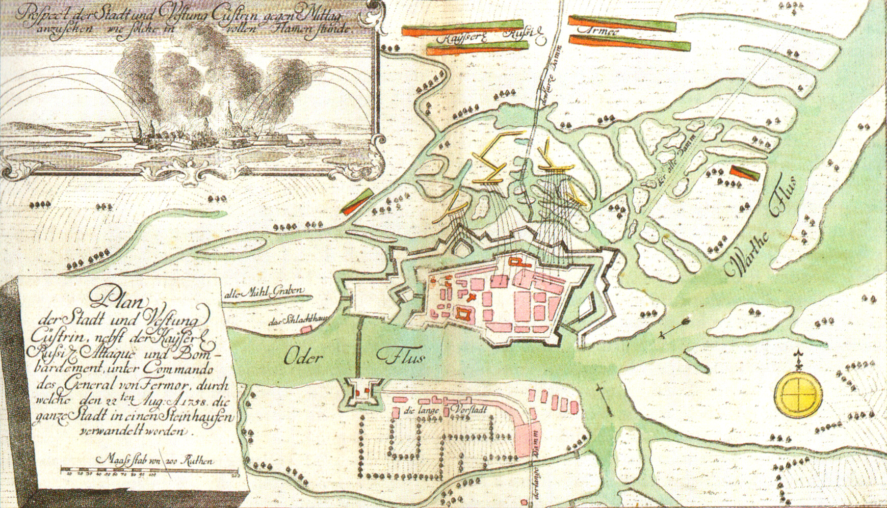 Осада Кюстрина